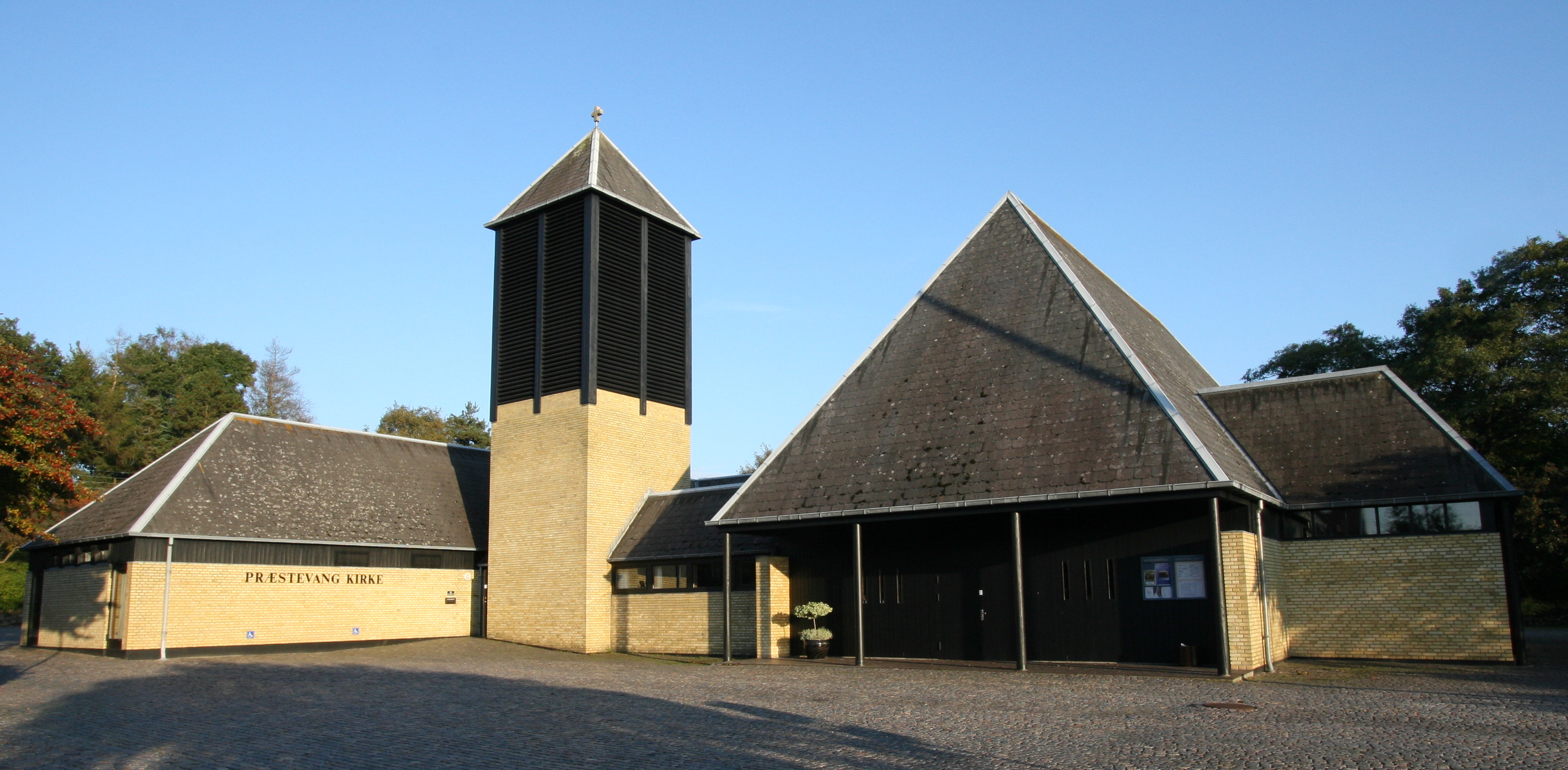 Præstevang Kirke, Hillerød, Denmark. Præstevang Kirke